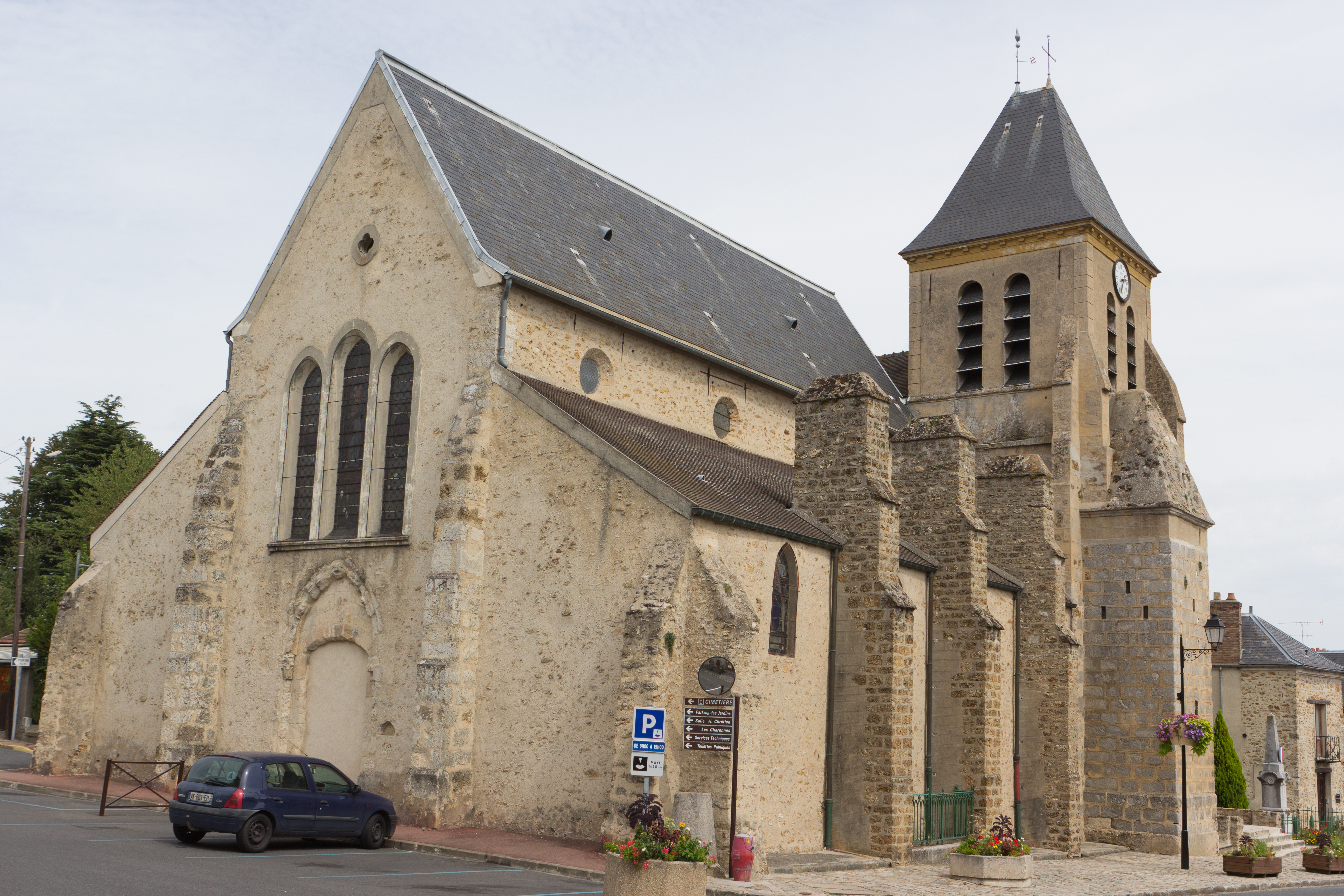 Eglise de Saint-Vrain, commune de Saint-Vrain, département de l'Essonne. France.